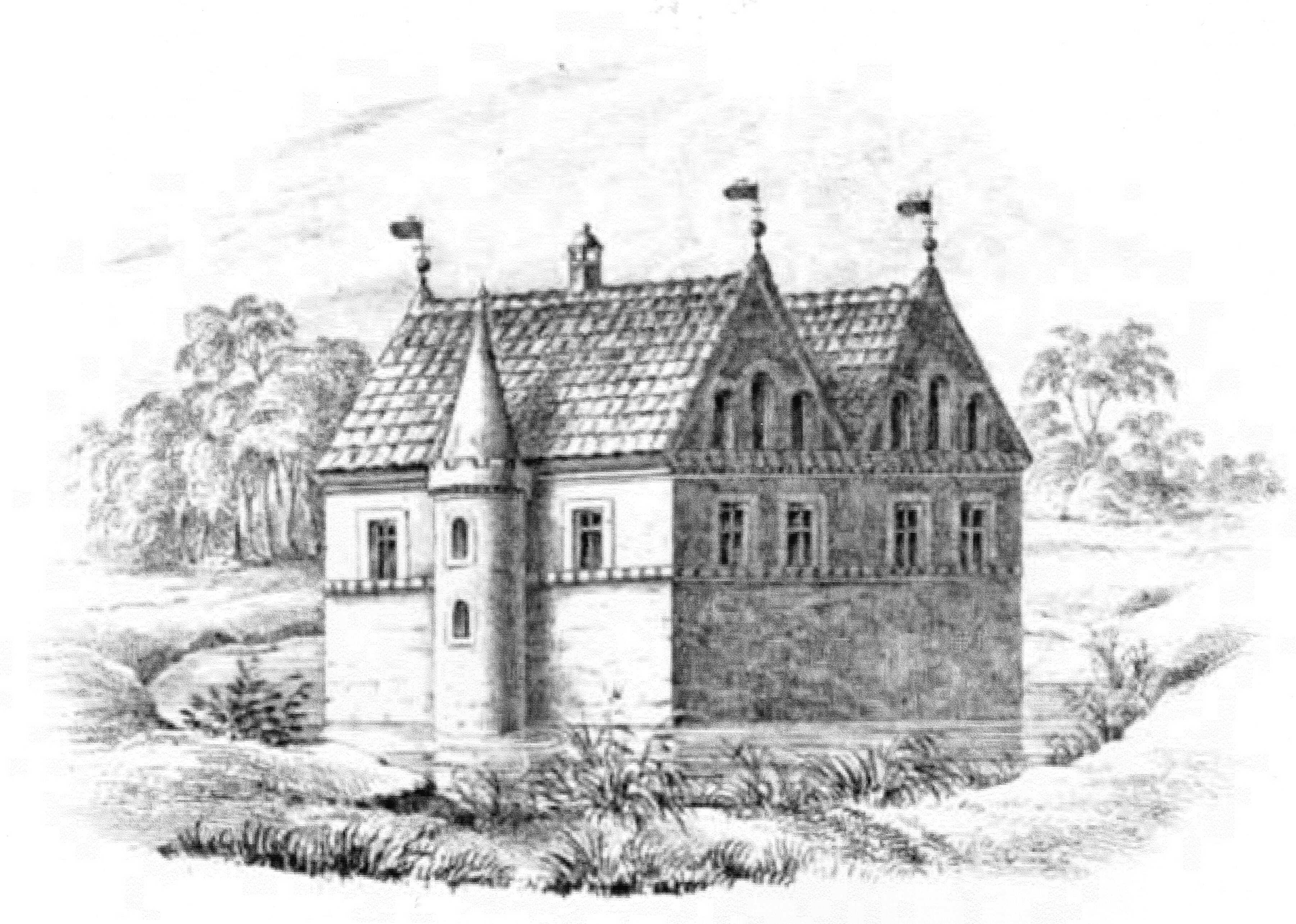 Gut Hasselburg, Zeichnung von Köhler und Roisternitz 1862